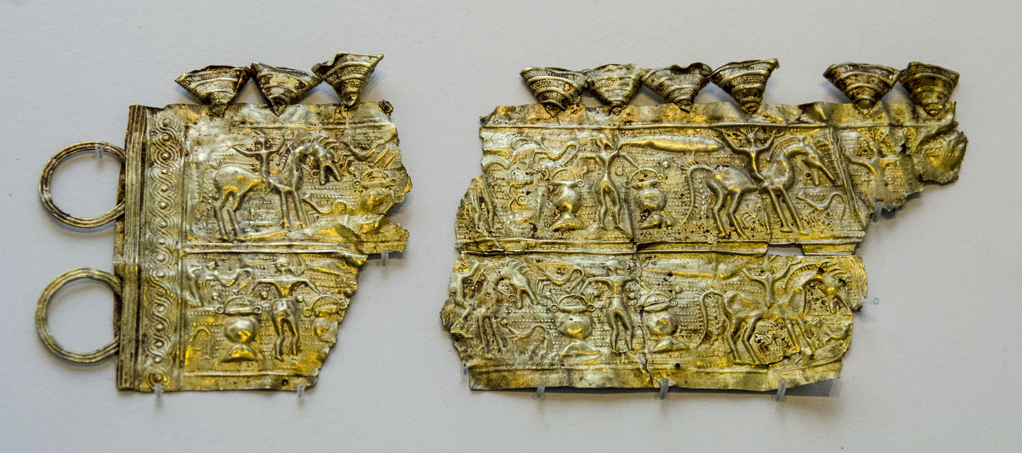 Fragmento de diadema o cinturón de los siglos III-I a.C. procedente del castro de Moñes, en Piloña, Asturias.